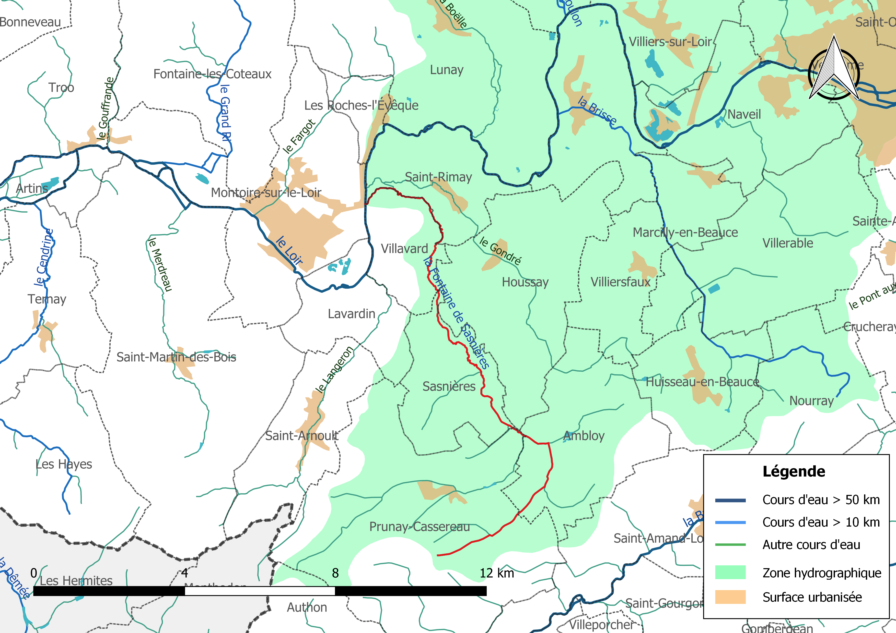 Carte du cours d'eau « la Fontaine de Sasnières » et de son bassin versant (zone hydrographique dans laquelle il s'insère).